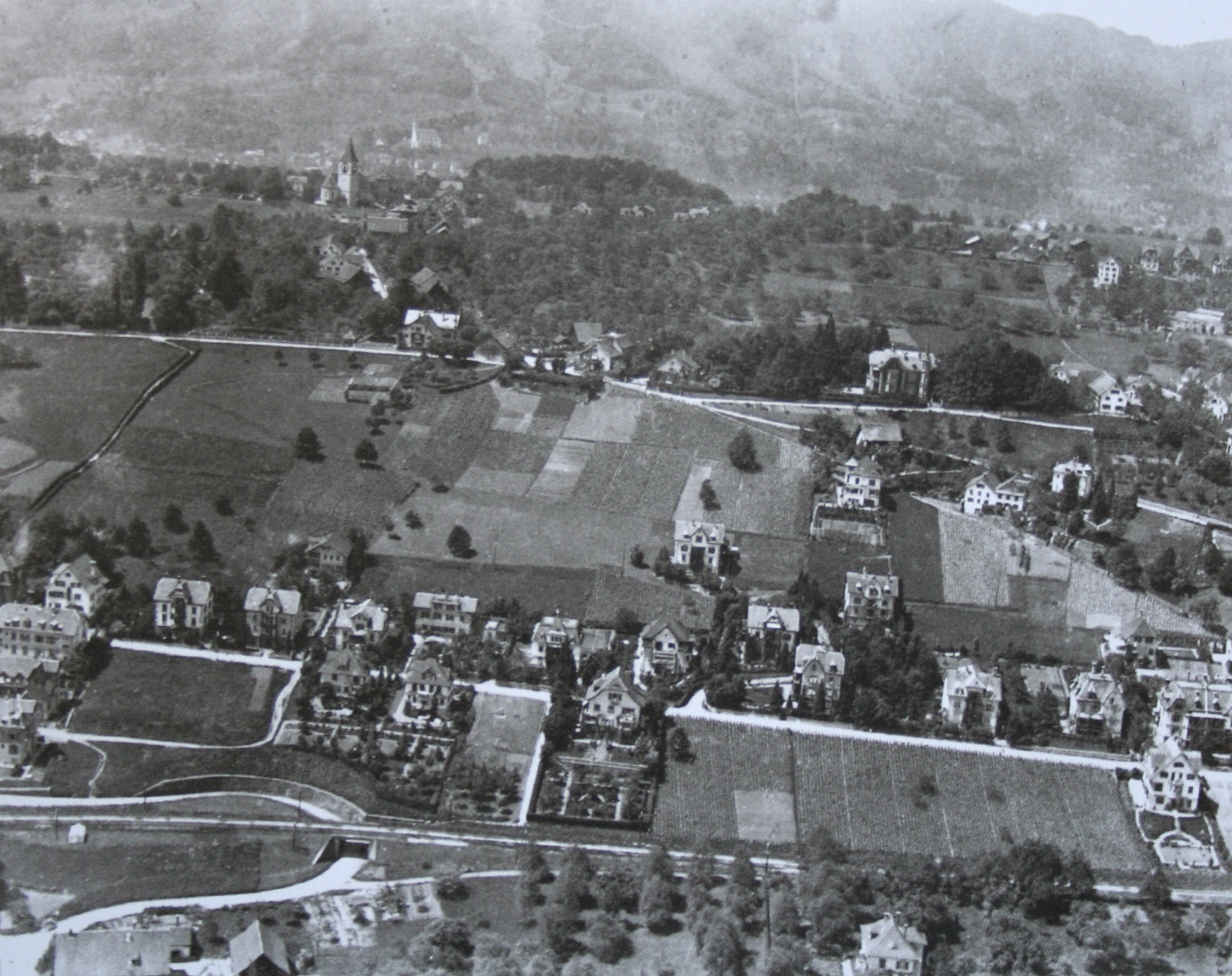 Kilchberg ZH vor 1920, Aufnahme von Walter Mittelholzer (1894 - 1937)